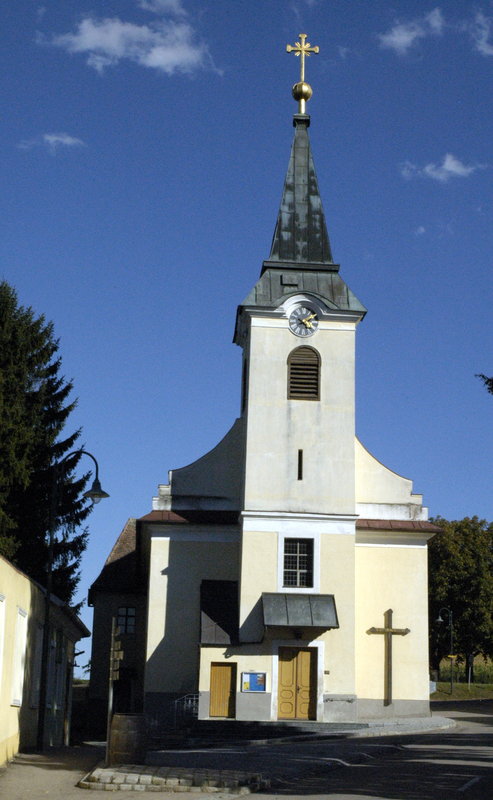 katholische Pfarrkirche Heilige Dreifaltigkeit in Deinzendorf, Gemeinde Zellerndorf